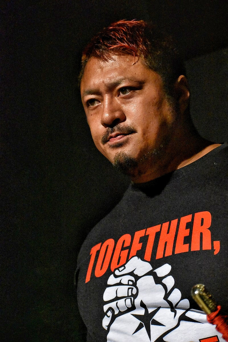 プロレスラーの火野裕士選手